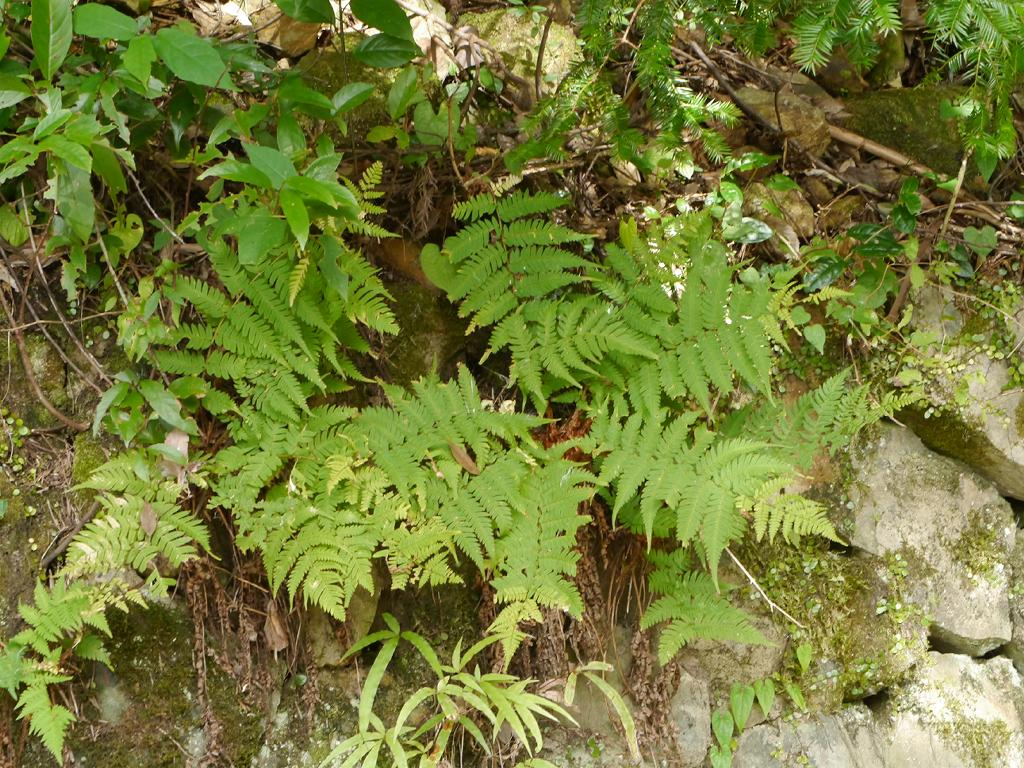 Dryyopteris lacera：クマワラビ 2014/10/12 和歌山県白浜町：Shirahama Town. Wakayama Pref. Japan